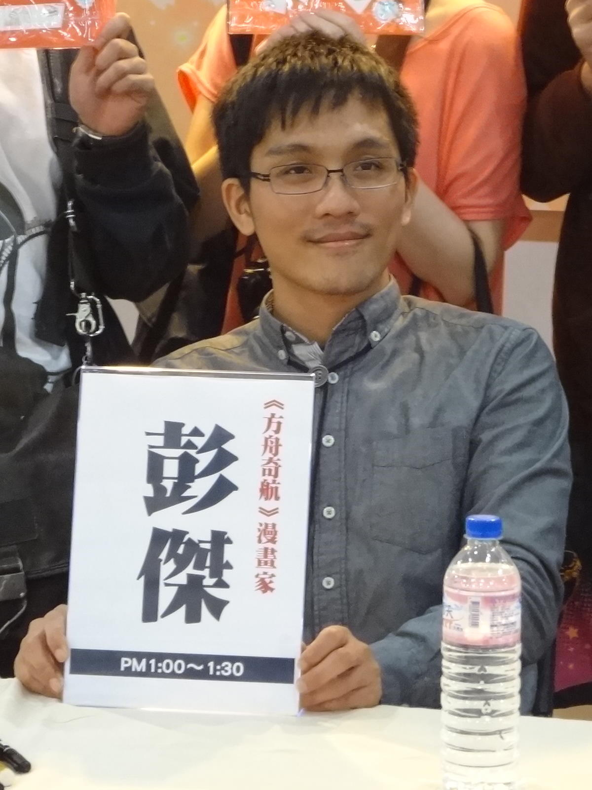 2013臺中動漫節，臺灣漫畫家彭傑在簽名會後與愛好者合照。